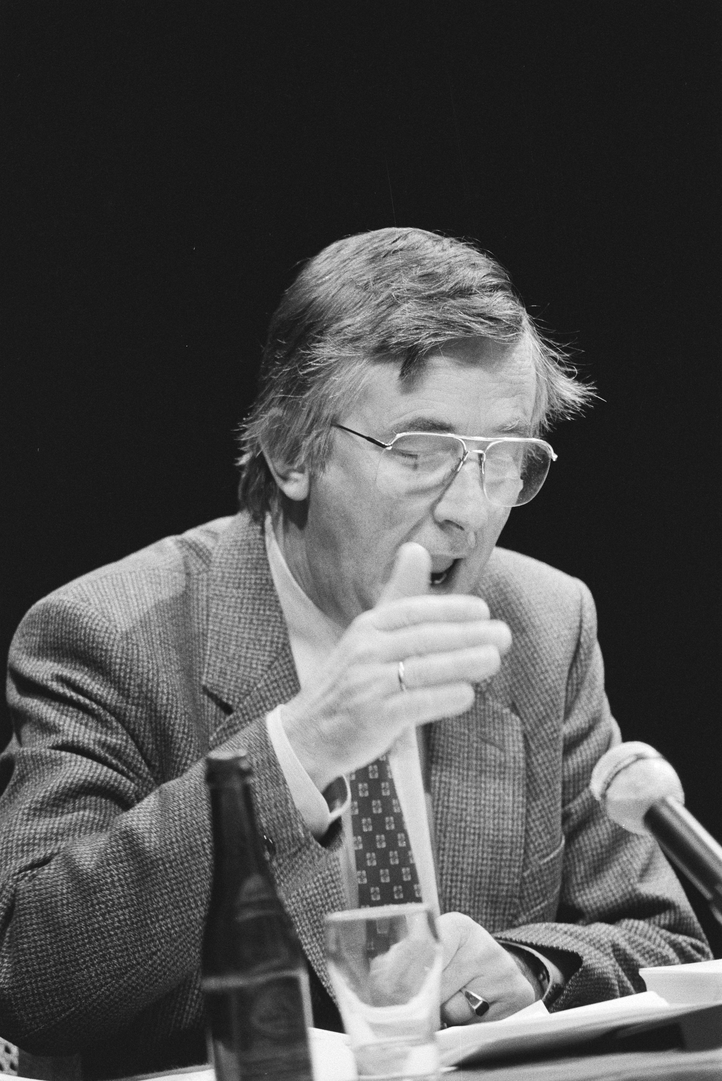 Collectie / Archief : Fotocollectie Anefo Reportage / Serie : [ onbekend ] Beschrijving : Prof. Bert ter Schegget Annotatie : Randnummers negatiefstrook: nr. 24 Huub Oosterhuis, nr. 25 Theun de Vries, 26, 27 Datum : 27 oktober 1982 Trefwoorden : schrijvers, theologen Persoonsnaam : Schegget, Bert ter Fotograaf : Antonisse, Marcel / Anefo Auteursrechthebbende : Nationaal Archief Materiaalsoort : Negatief (zwart/wit) Nummer archiefinventaris : bekijk toegang 2.24.01.05 Bestanddeelnummer : 932-3756